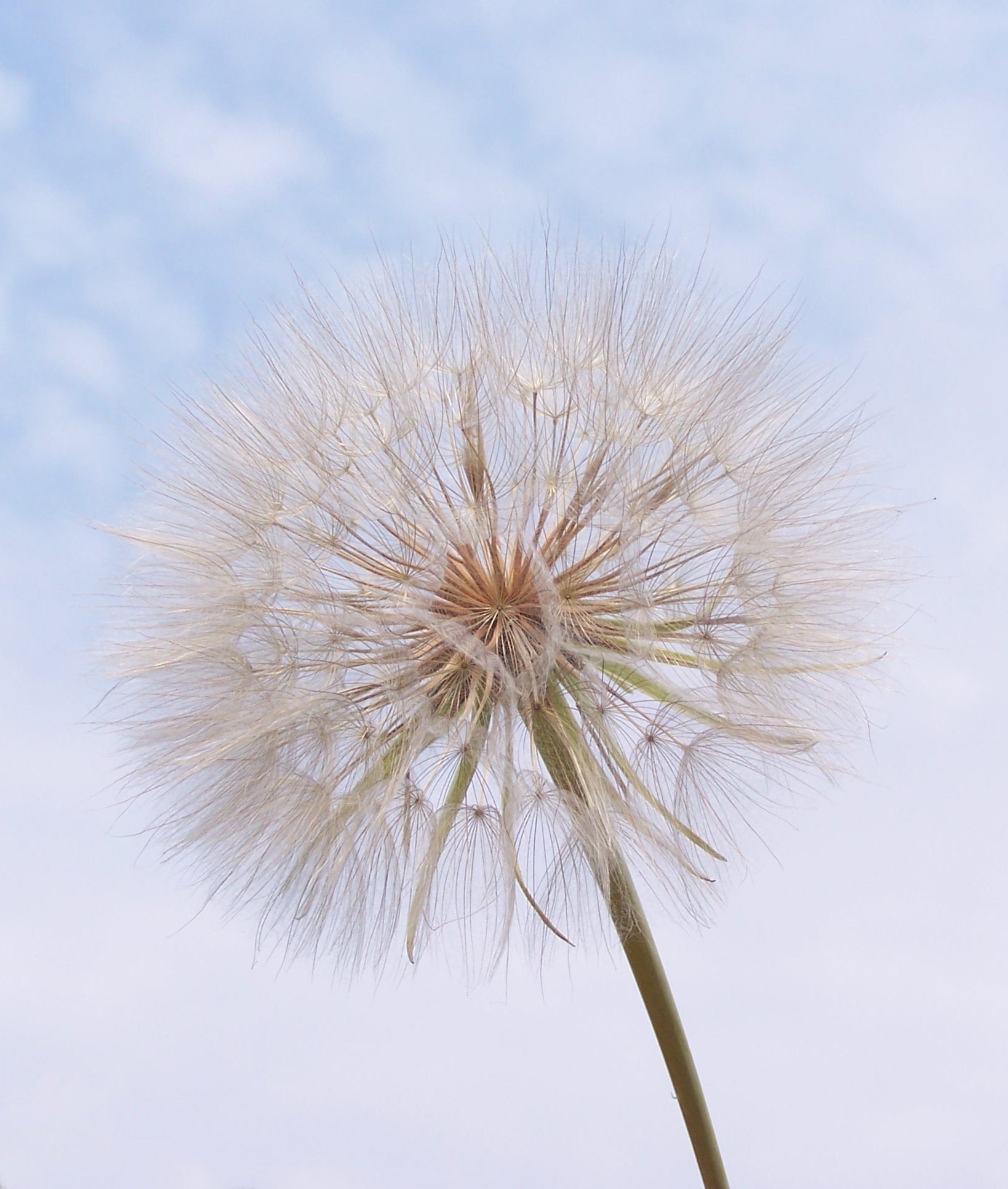 Tragopogon pratensis, Konstancin-Jeziorna, Poland